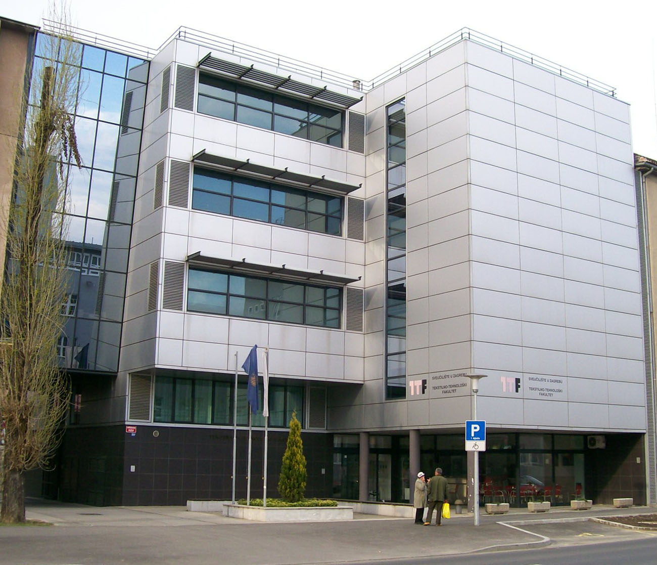 Tekstilno-tehnološki fakultet u Zagrebu